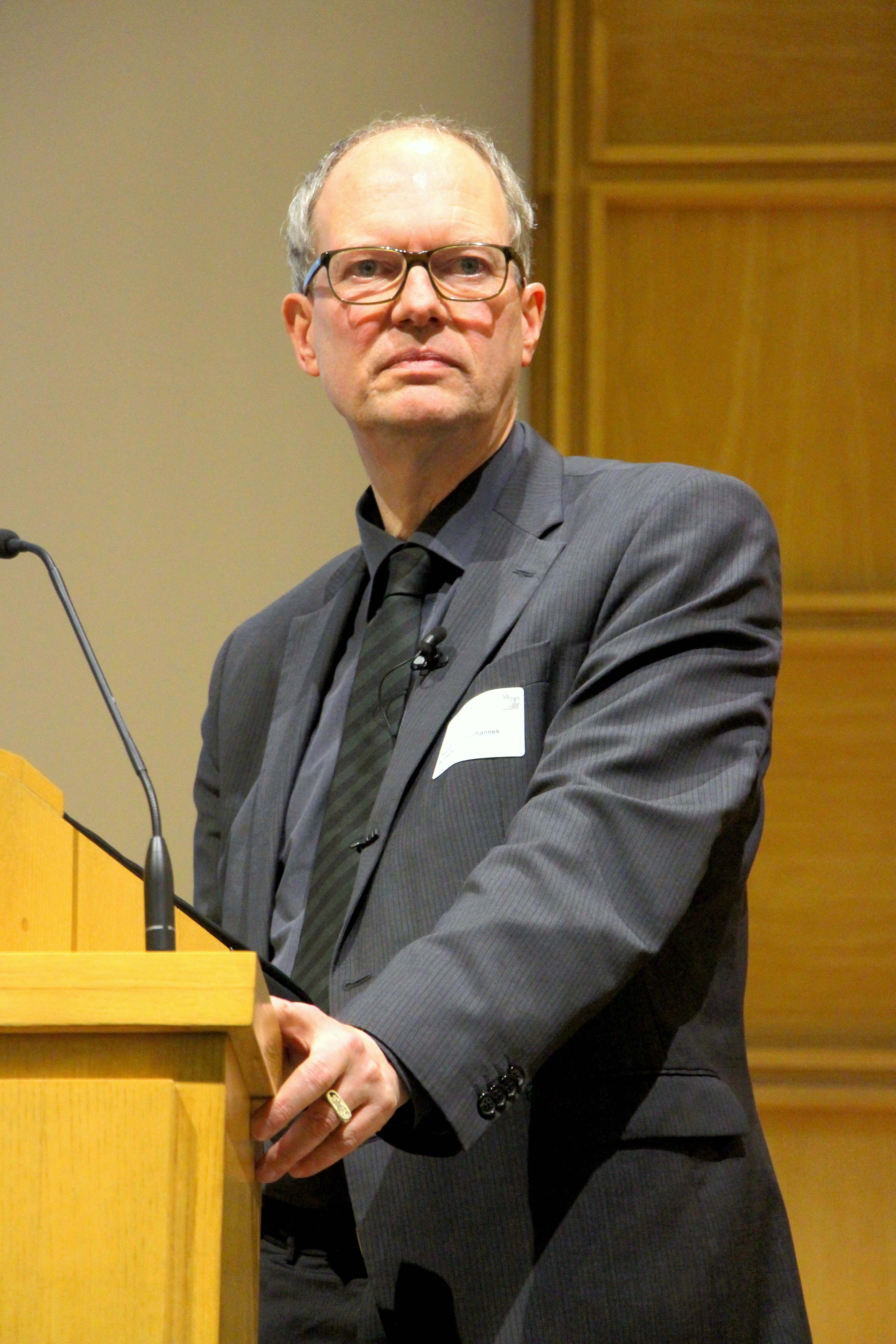 Wissenschaftsforum Universität Konstanz Gerda-Henkel-Stiftung 2015, Düsseldorf.